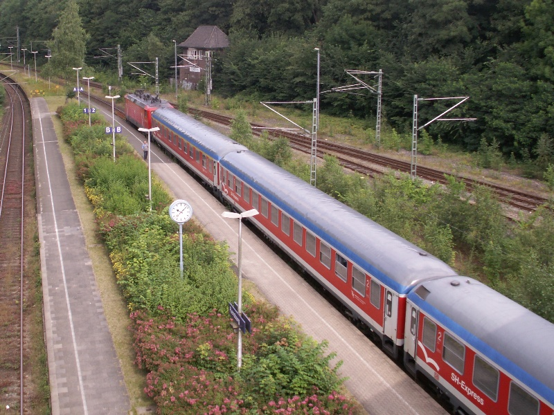 SH-Express in Flensburg. Der SH-Express im Flensburger Hauptbahnhof.